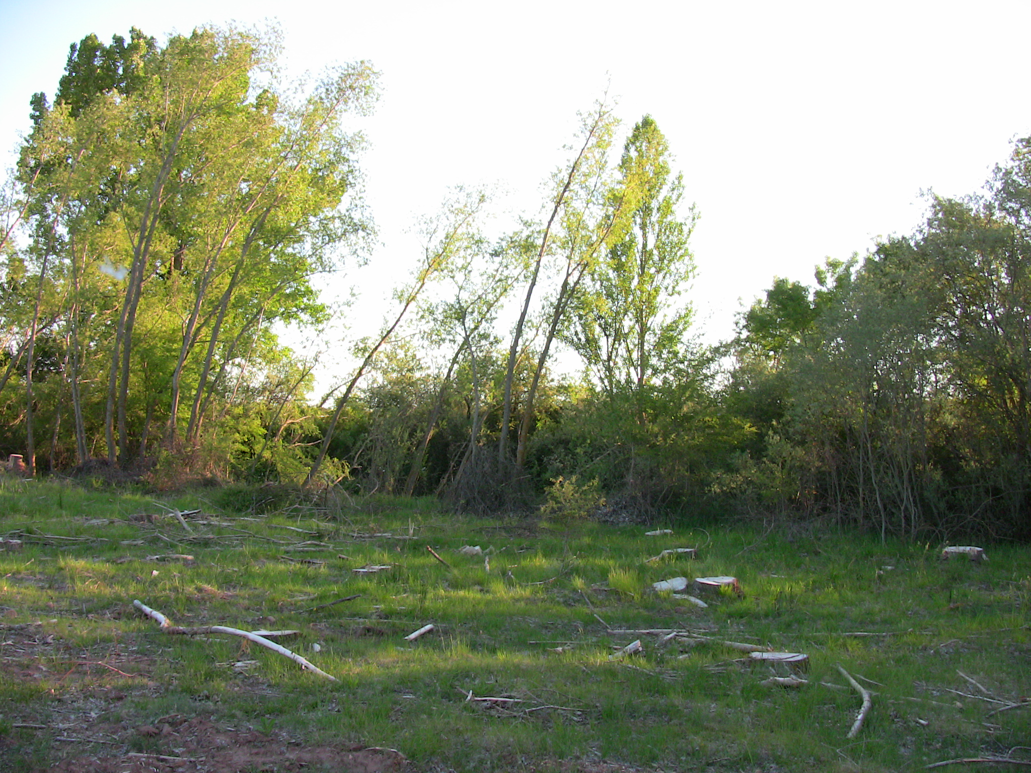 OTRA VISTA DEL POZO DE LAS TERRERAS. POSIBLE EMPLAZAMIENTO DEL CONVENTO